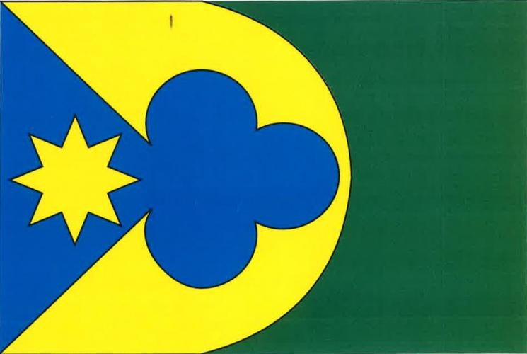 Libež vlajka